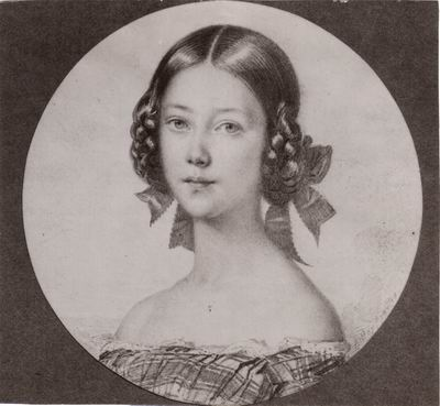 Maria Anna von Preußen, zweite Ehefrau von Friedrich Wilhelm Georg Adolf